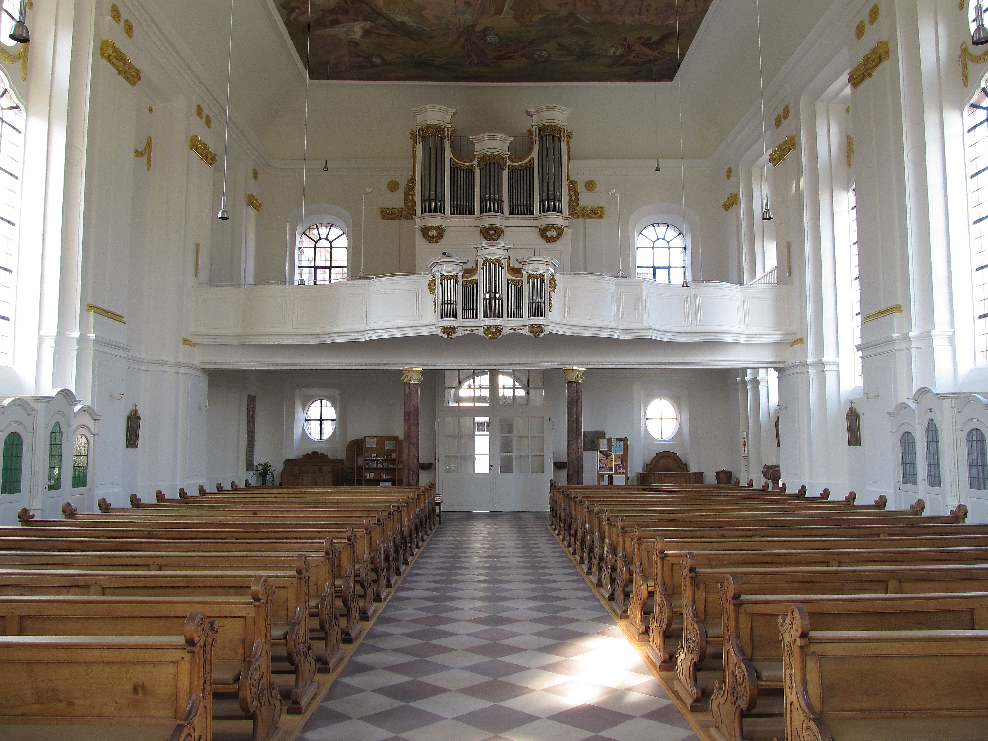 Blick ins Innere der Schlosskirche Blieskastel, Saarland